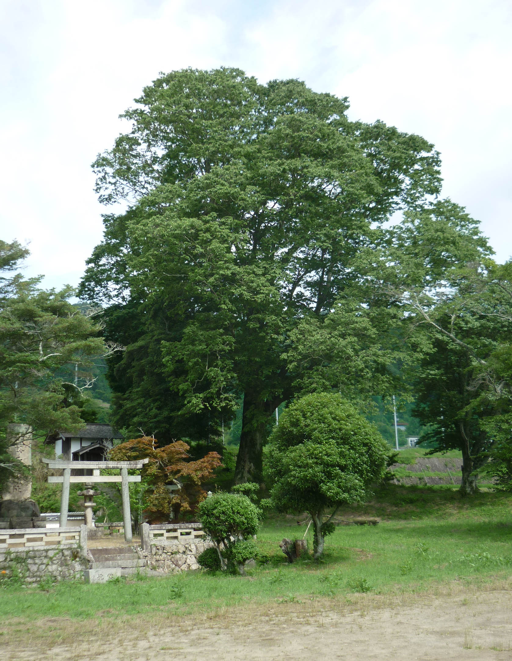 城内にあるモッコクの古木